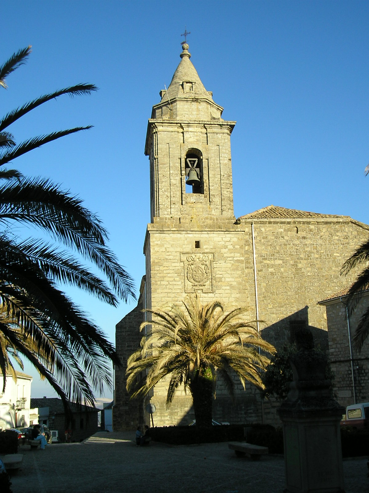 Parroquia de San Pedro, Sabiote